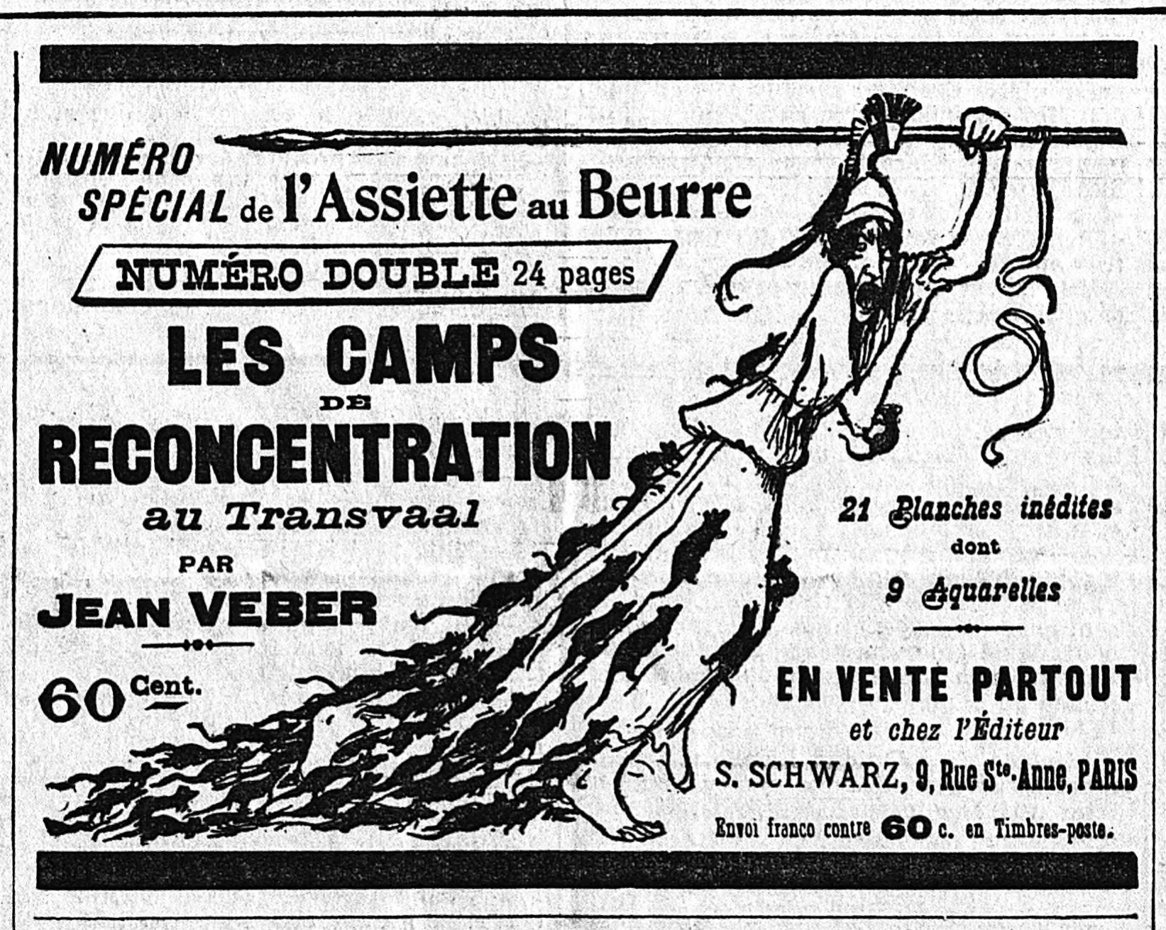 Publicité dans L'Echo de Paris pour le N° 26 de L'Assiette au beurre